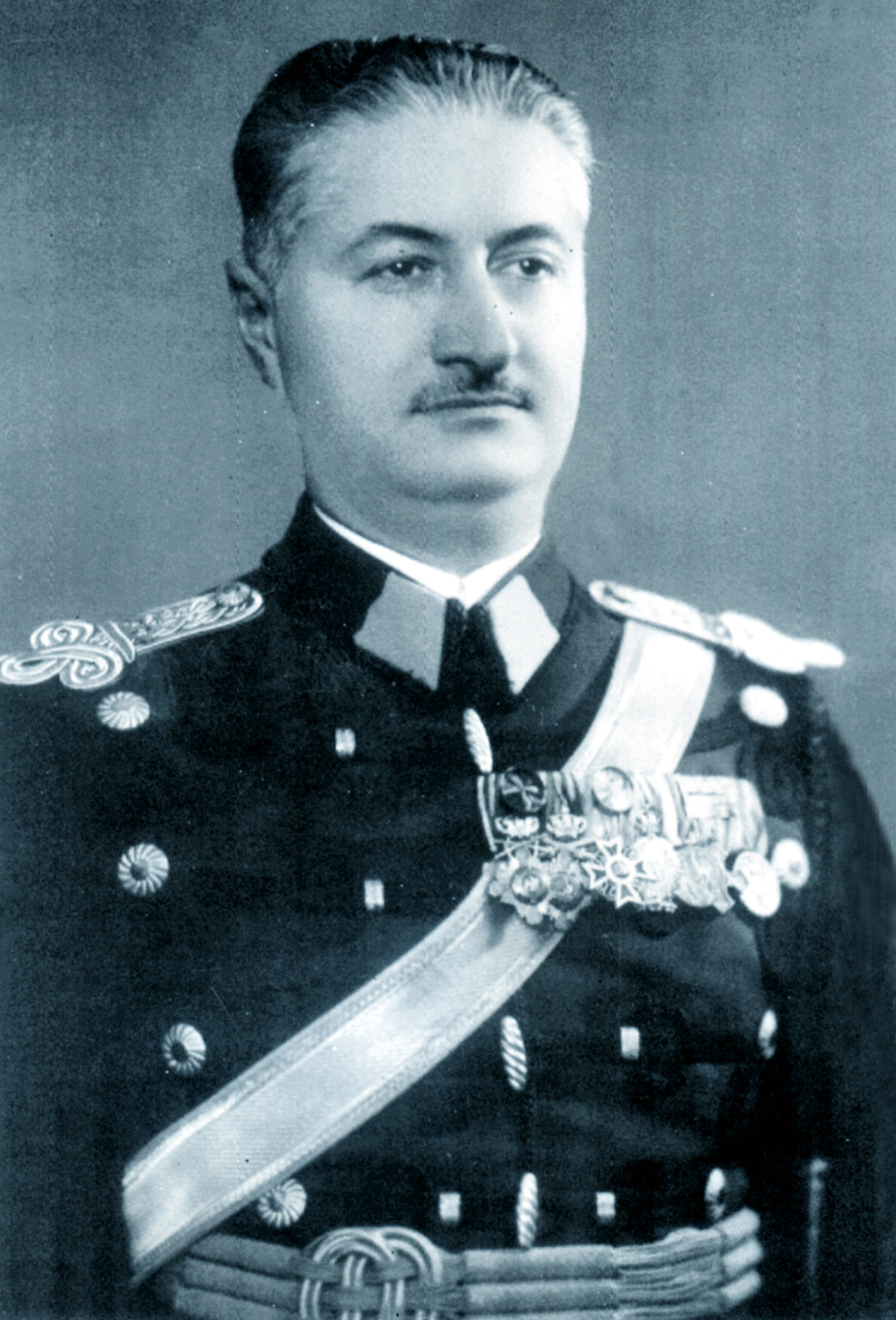 Aurel Racovitză als Brigade-General 1939